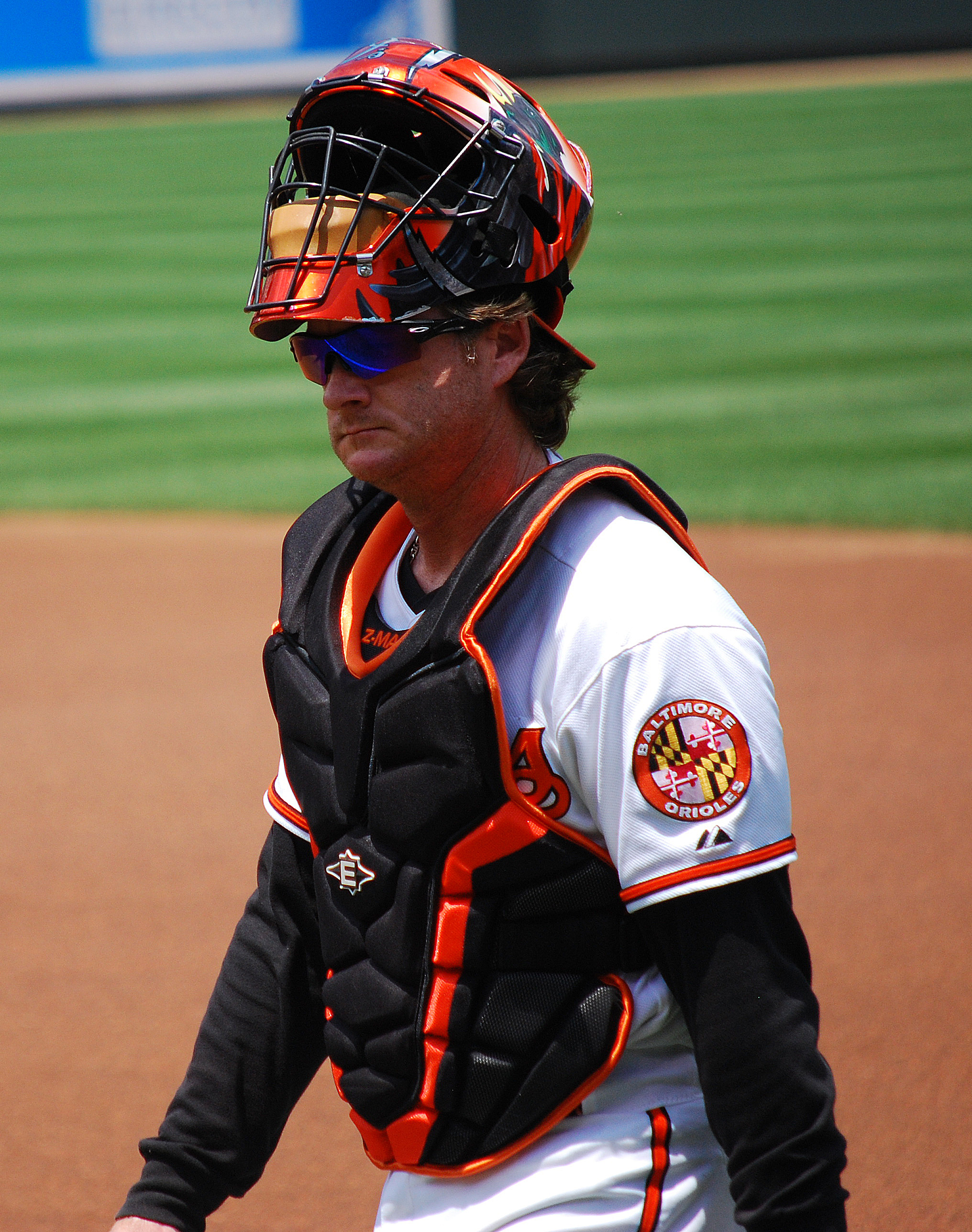 Gregg Zaun